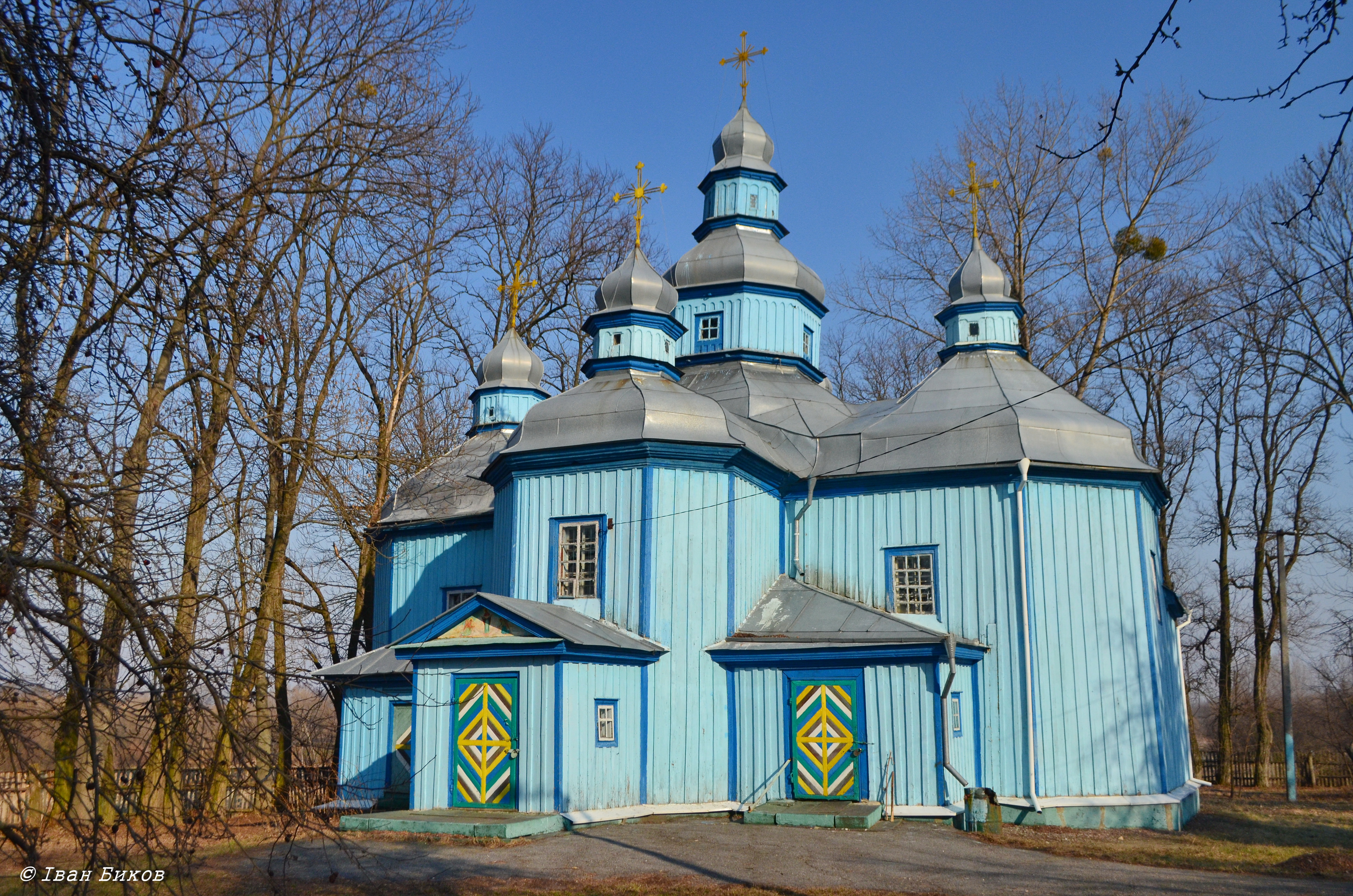 Горбулів. Унікальна дерев'яна козацька Миколаївська церква. 1746 р.